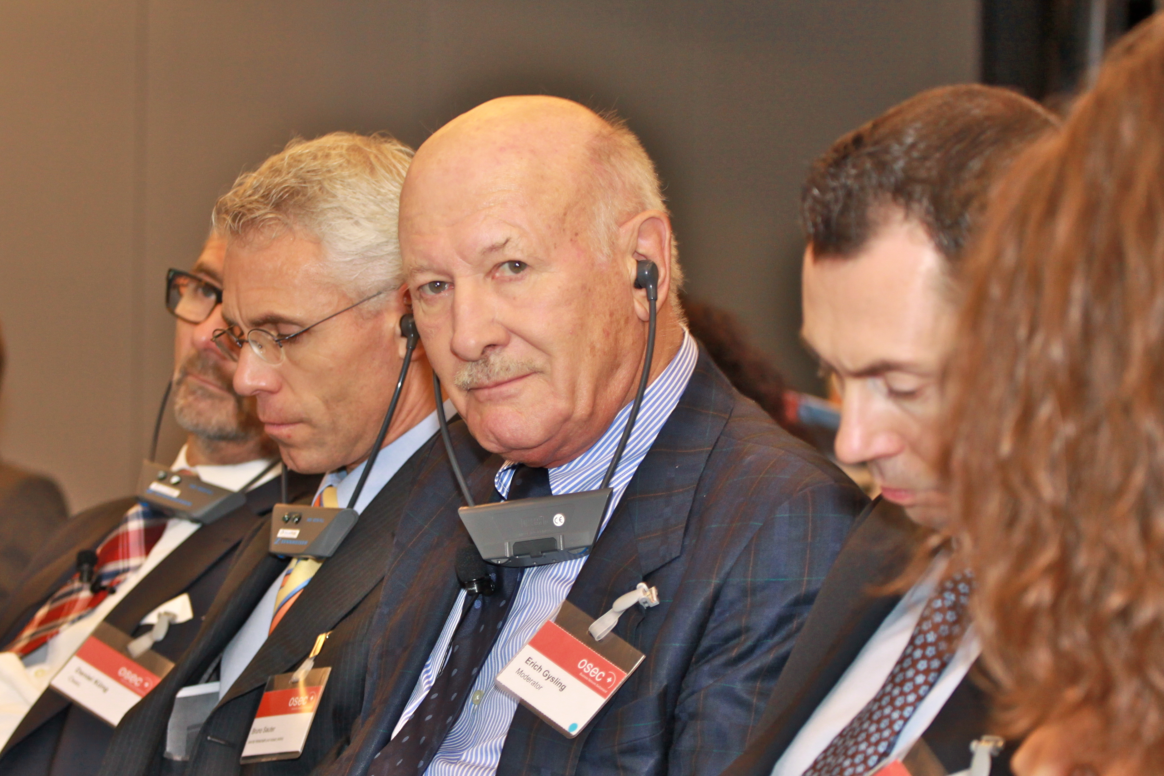 Sie dürfen das Foto mit Nennung des Autors honorarfrei vervielfältigen, verbreiten und öffentlich zugänglich machen. Foto: Jürg Vollmer / Infos